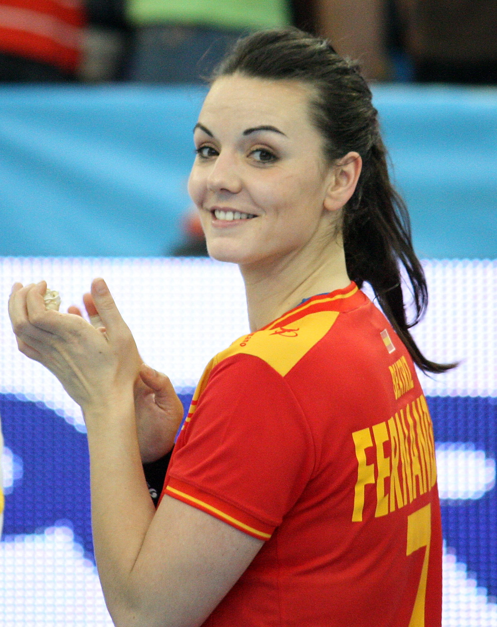 Beatriz Fernández en el torneo celebrado en España, del 25 al 27 de mayo de 2012, clasificatorio para los Juegos Olímpicos de Londres 2012.